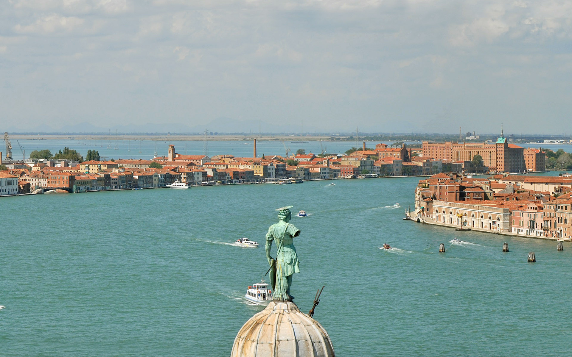 Le canal de la Giudecca depuis le campanile de San Giorgio Maggiore